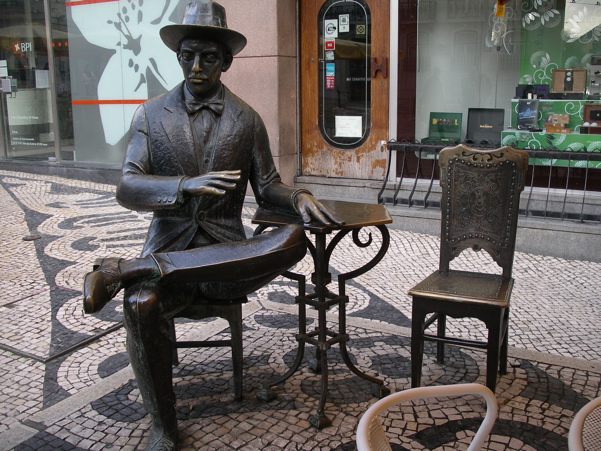 Pessoa Statue 01